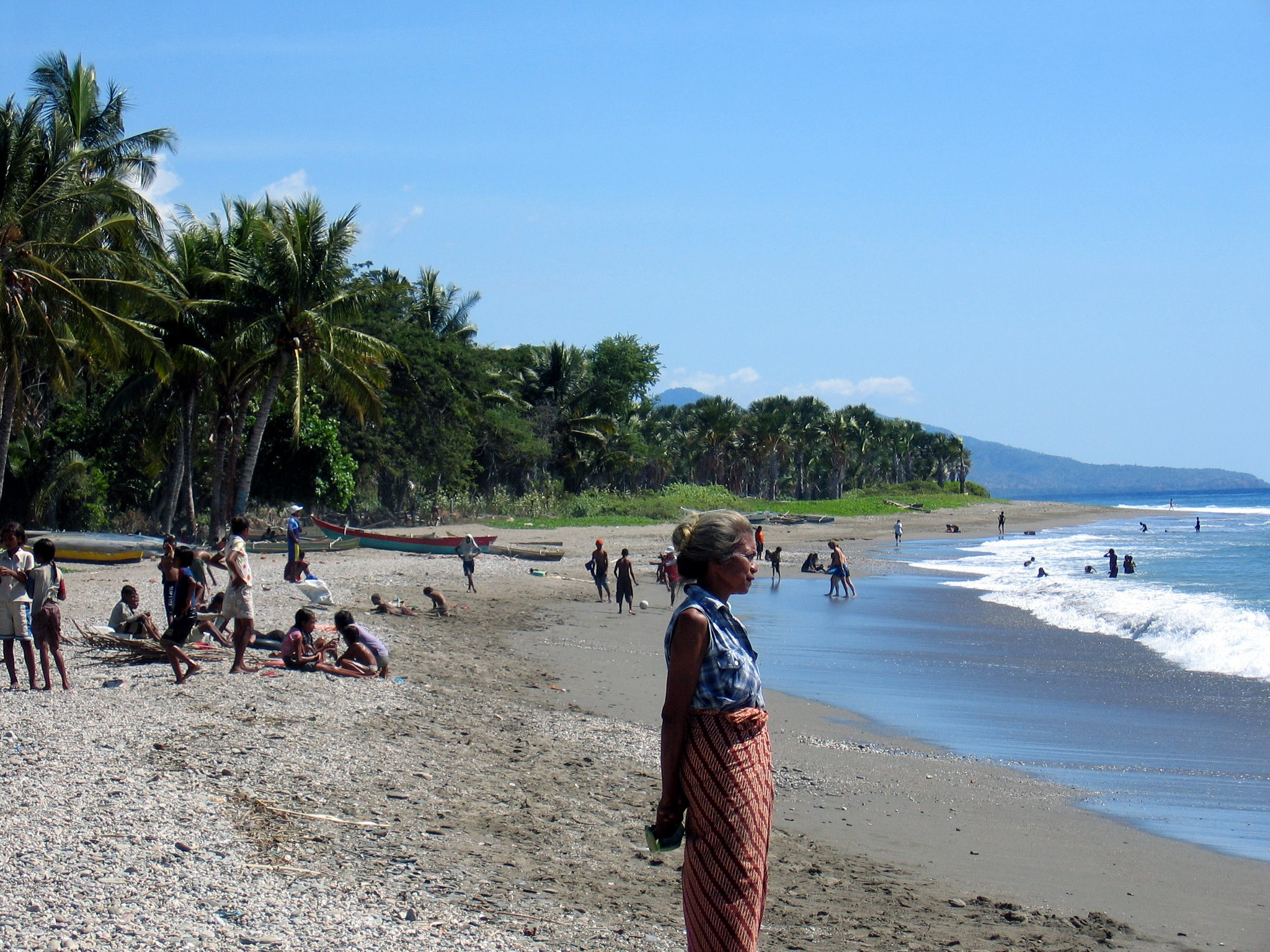 Strand nahe der Mündung des Comoro, Dili